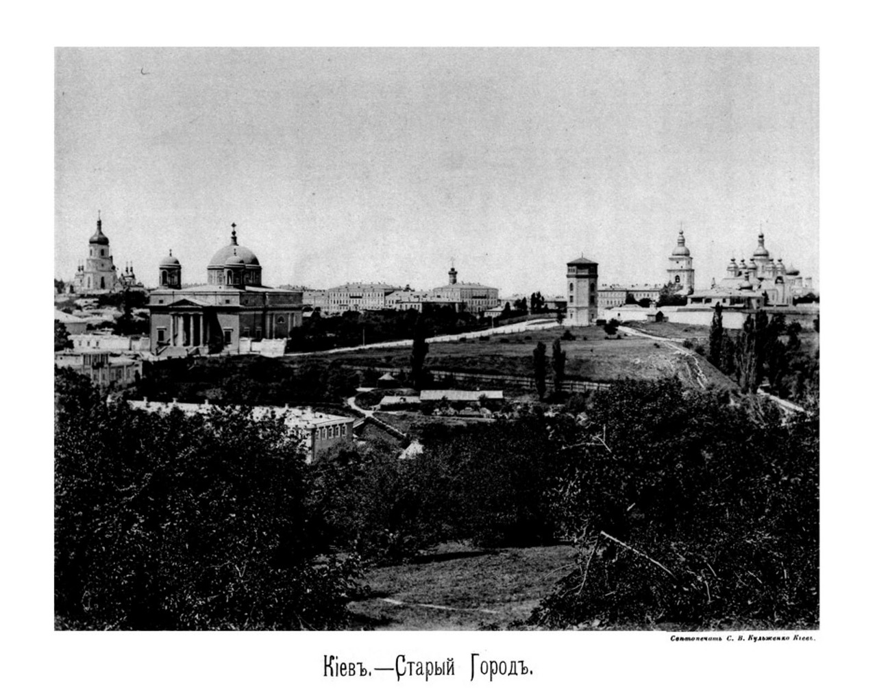 Старе місто Київ (Old Town, Kyiv) 1888